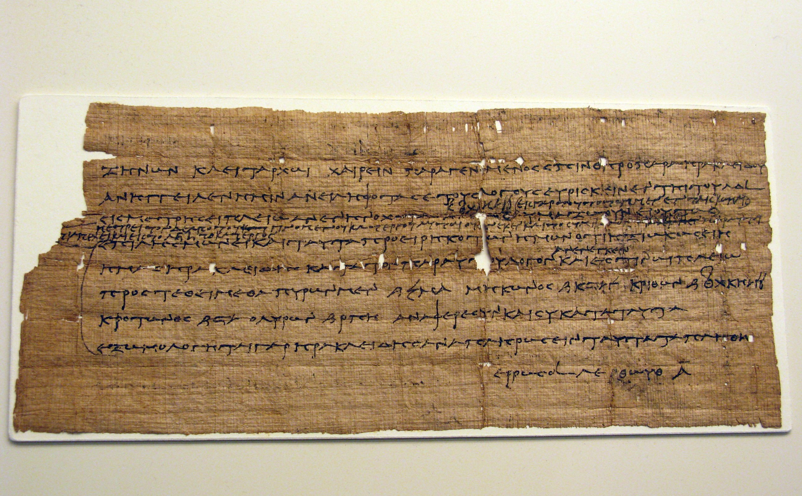 Rough translation: "Part of a papyrus with Greek writing. It constitutes a part of a letter, that is reported in arrangement of tax suspenses. It belongs to the Zenon Archive, dignitary and administrator of royal property. From Fagioym. 3rd century B.C." National Archaeological Museum, Athens, Greece. --- "Τμήμα παπύρου με ελληνική γραφή. Αποτελεί τμήμα επιστολής, που αναφέρεται σε τακτοποίηση φορολογικών εκκρεμοτήτων. Ανήκει στο Αρχείο του Ζήνωνα, αξιωματούχου και διαχειριστή βασιλικού κτήματος. Από το Φαγιούμ. 3ος αι. π.Χ."